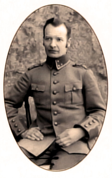 Wäinö Mikkonen